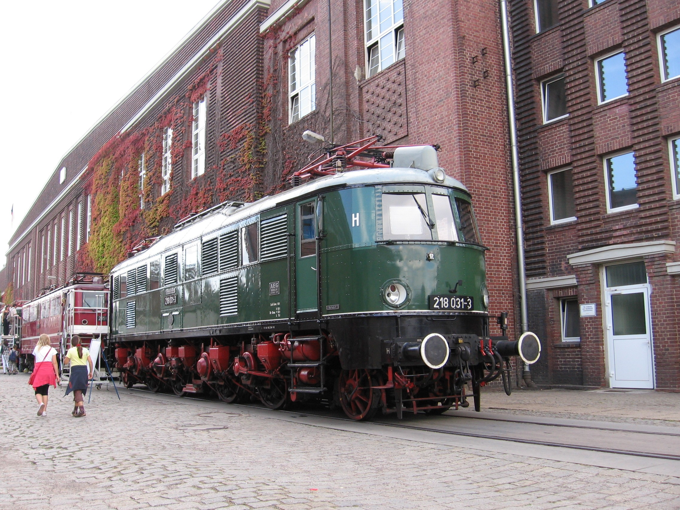 Elektrolokomotive 218 031-3 im Ausbesserungswerk Dessau, Sommer 2009